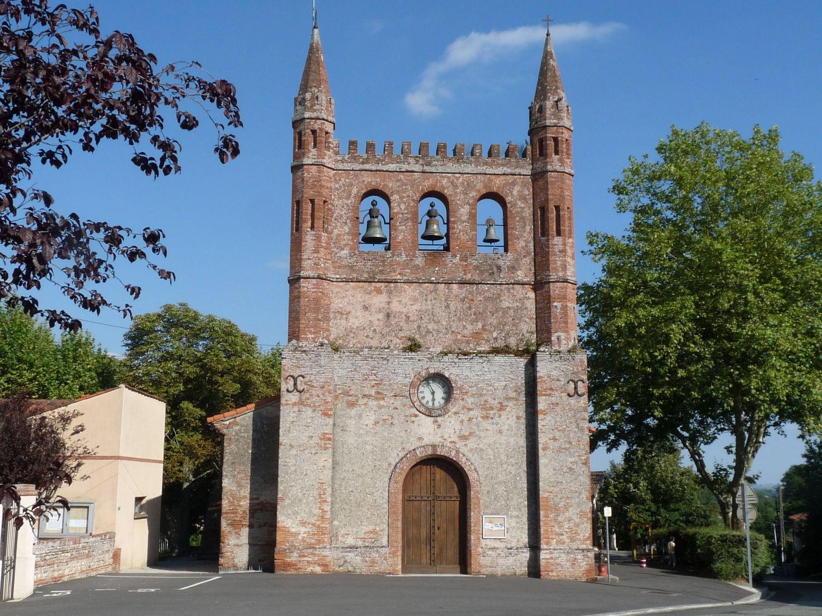 Eglise de Noueilles, Haute-Garonne, France